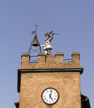 Uhrturm "Torre di Pucinella" in Montepulciano